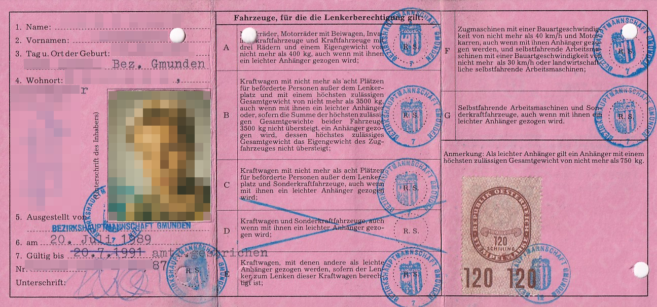 Führerschein der Gruppen A / B / C / E / F / G aus Österreich ausgestellt im Jahr 1989